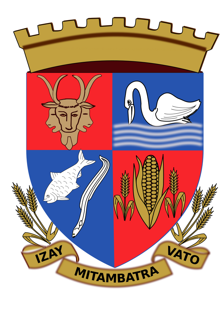 Blason d'Ambatondrazaka